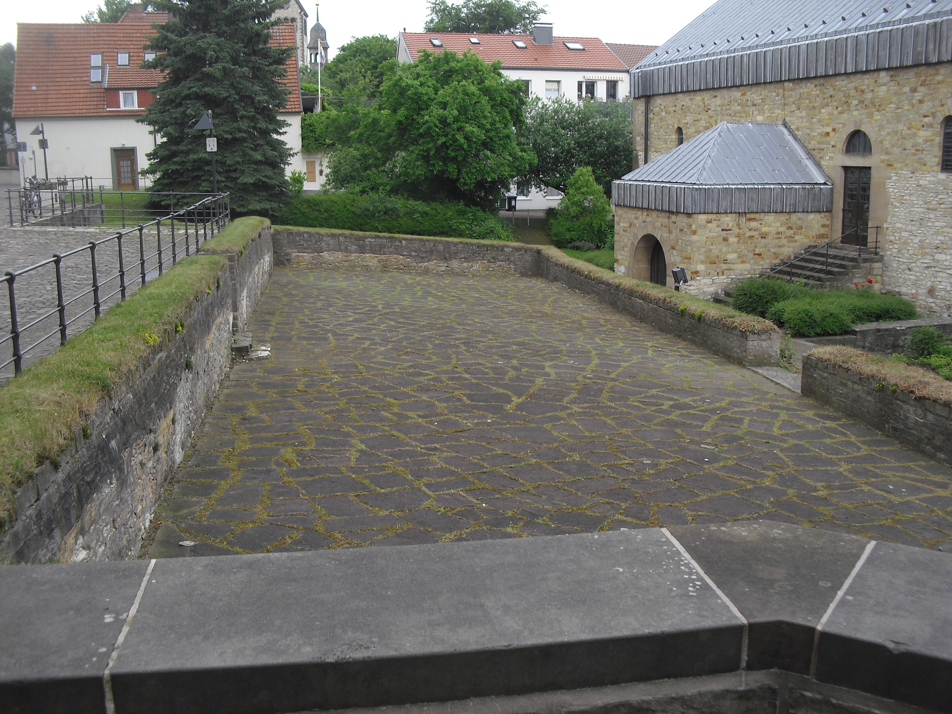 Reste der Kaiserpfalz Karls des Großen in Paderborn